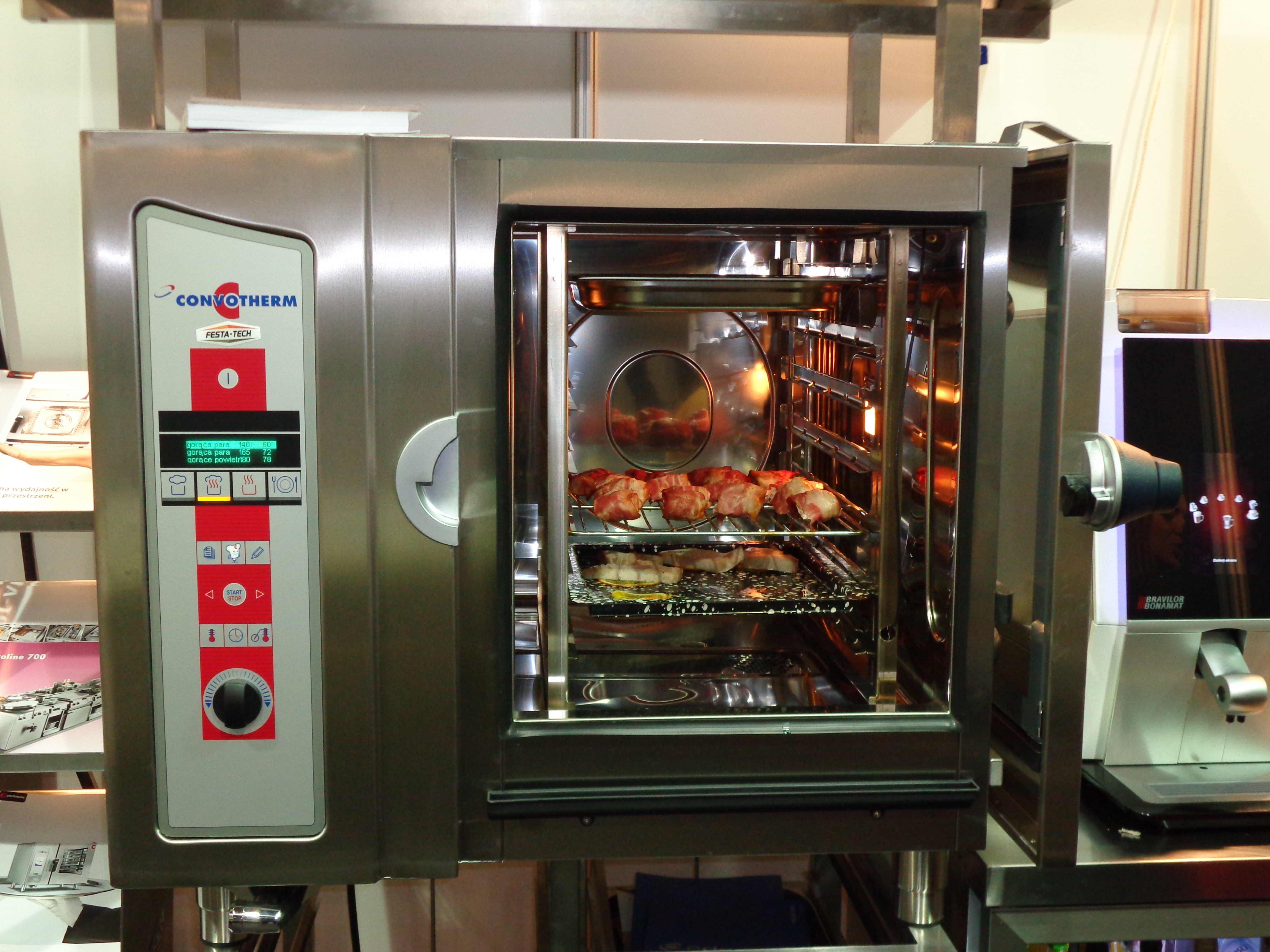 Piec konwekcyjno-parowy "Convotherm" prezentowany podczas Targów HORECA 2013 w Krakowie.